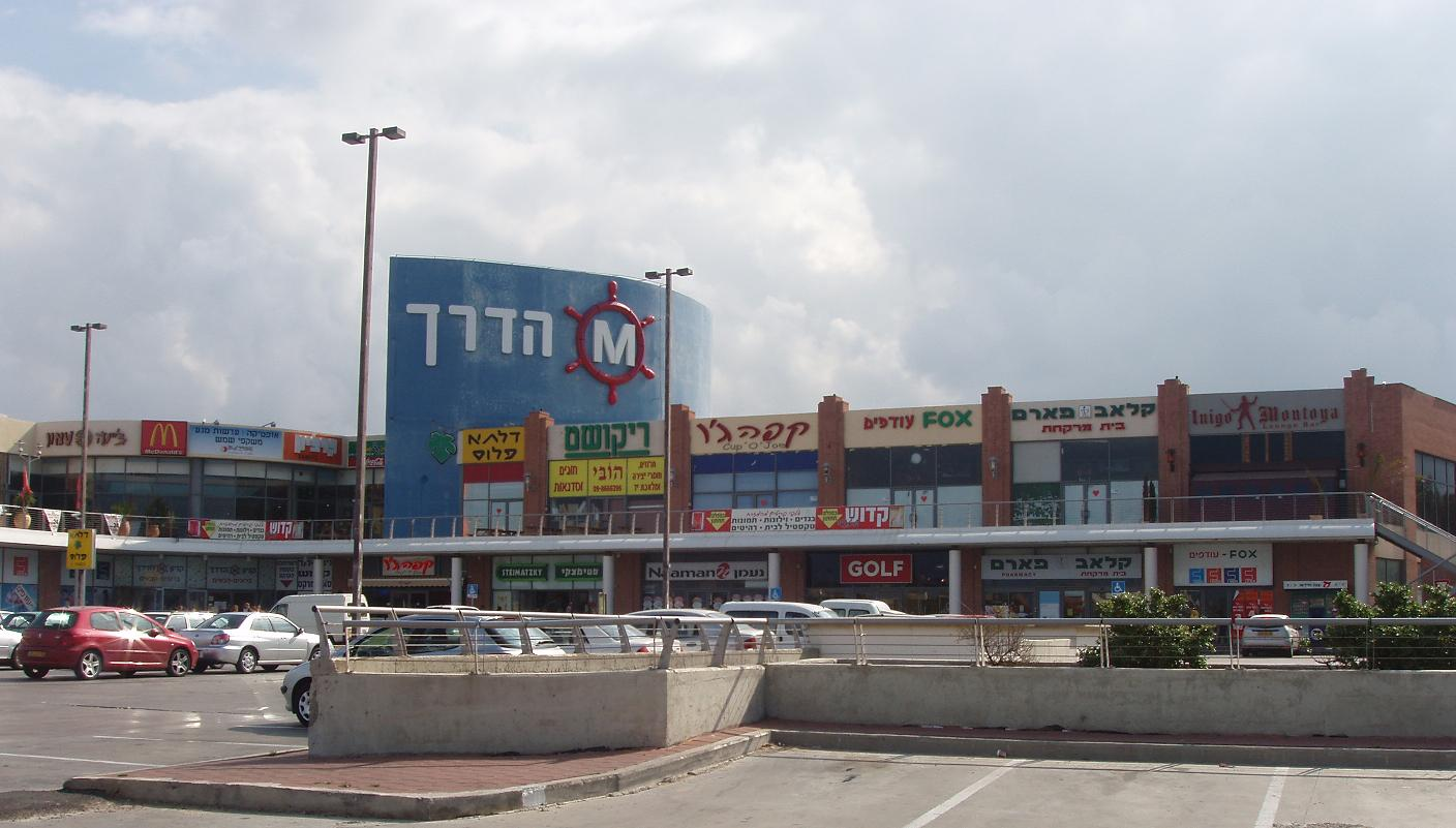 קניון M הדרך. צילם דוד שי.